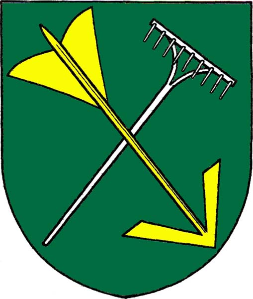 Znak obce Hrušovany u Brna